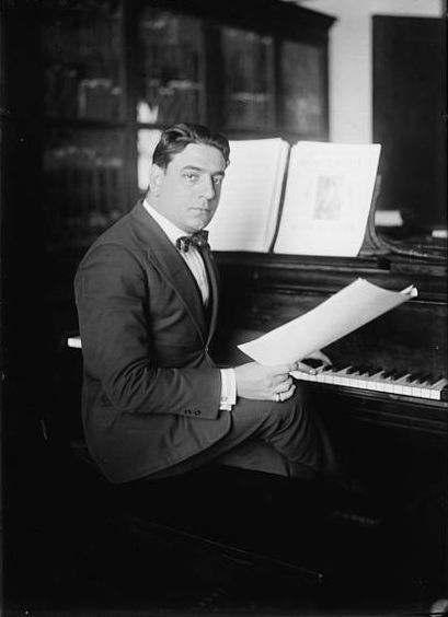 Tito Schipa (1888 – 1965), Italian tenor